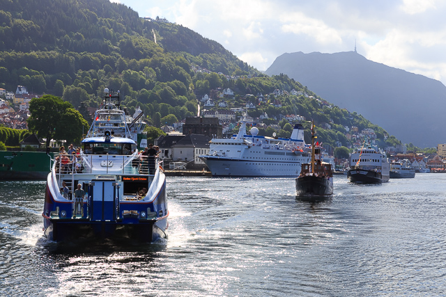 MS Rygercruise, MS Granvin og MF Skånevik på vei ut Vågen i Bergen.